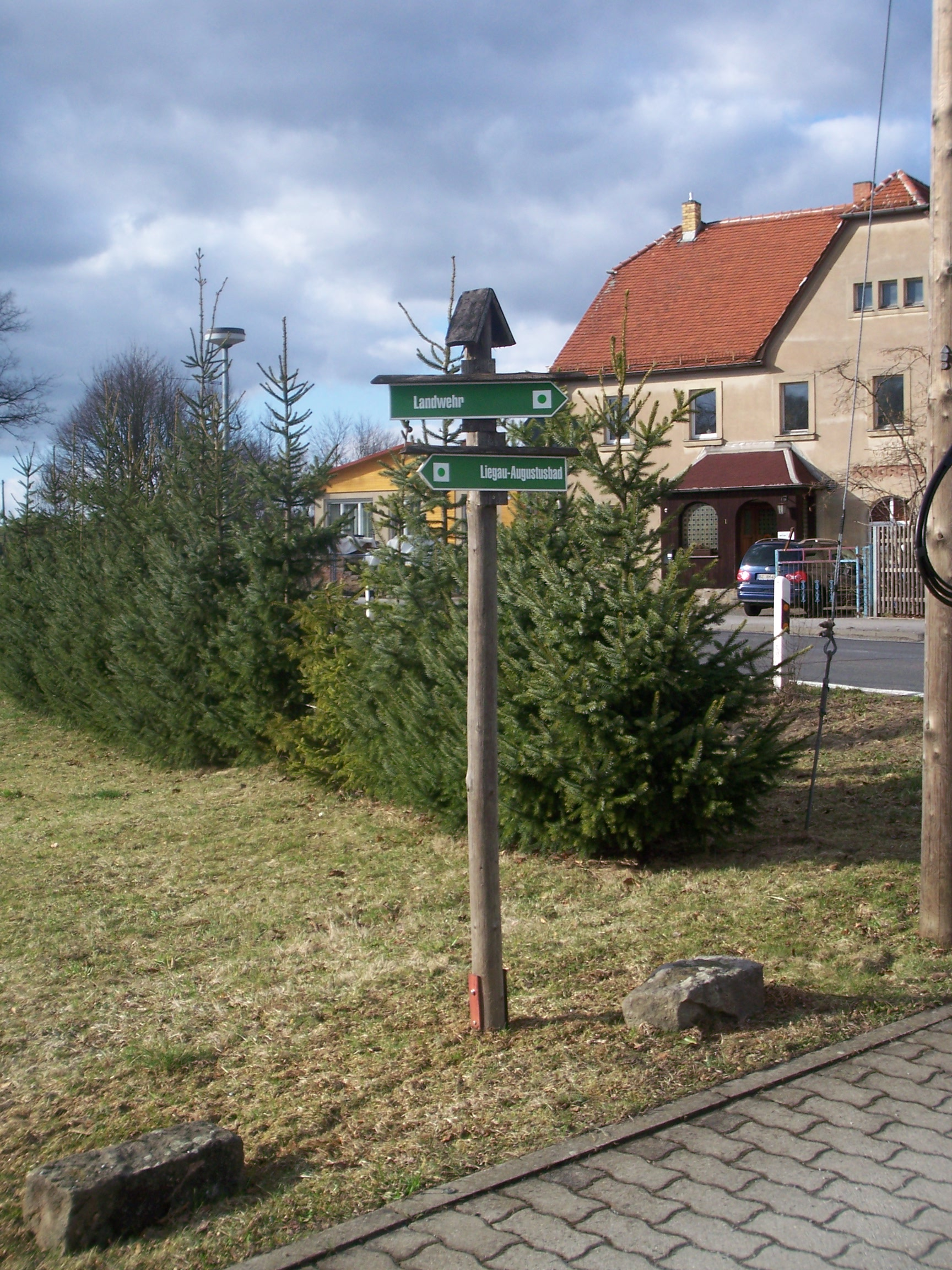 Wegweiser am Radeberger Rundwanderweg in Feldschlößchen. Im Hintergrund ist die ehemalige Knorpelschänke zu sehen.